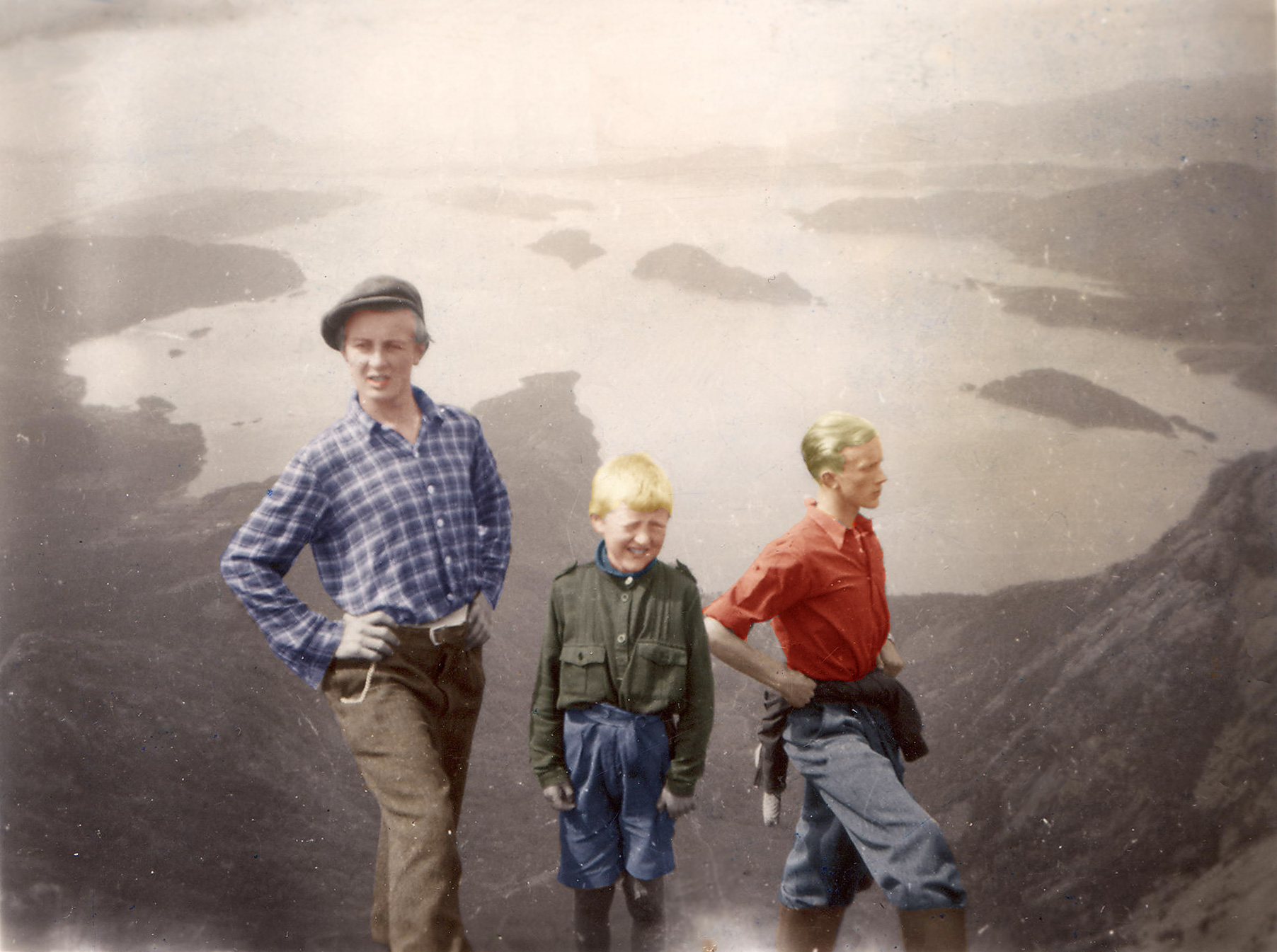 Håsteinen (vestre)1945